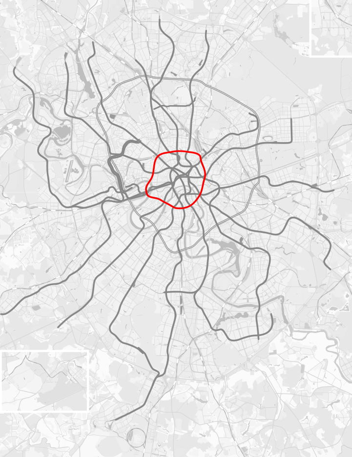 Кольцевая линия Московского метрополитена